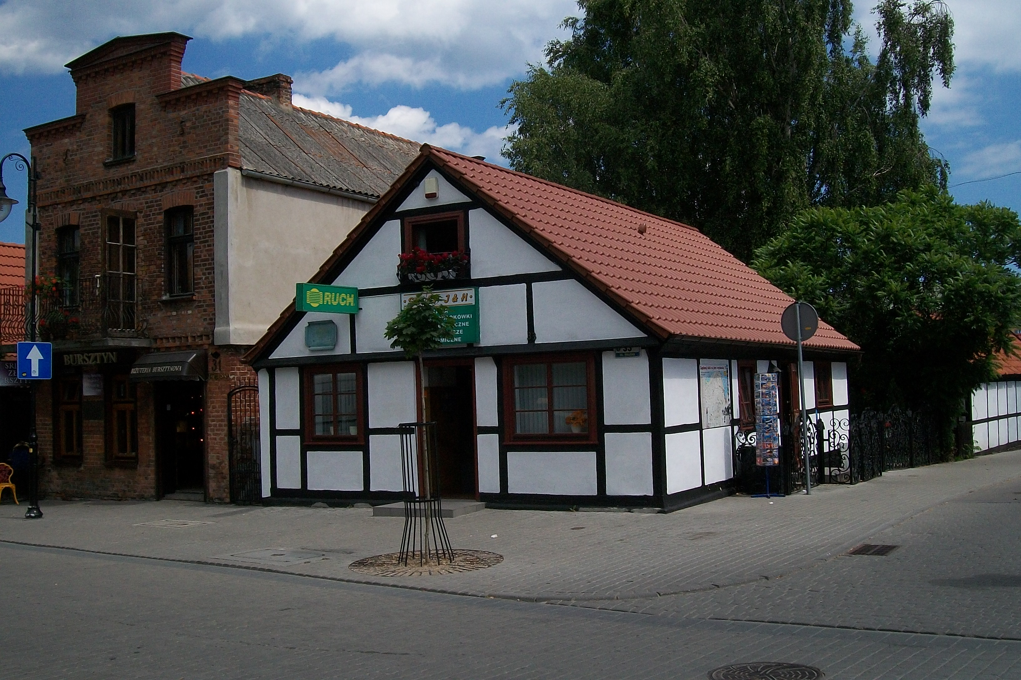 Hel, dom, poł. XIX ul. Wiejska 33 chata rybacka stan w 2013 r.